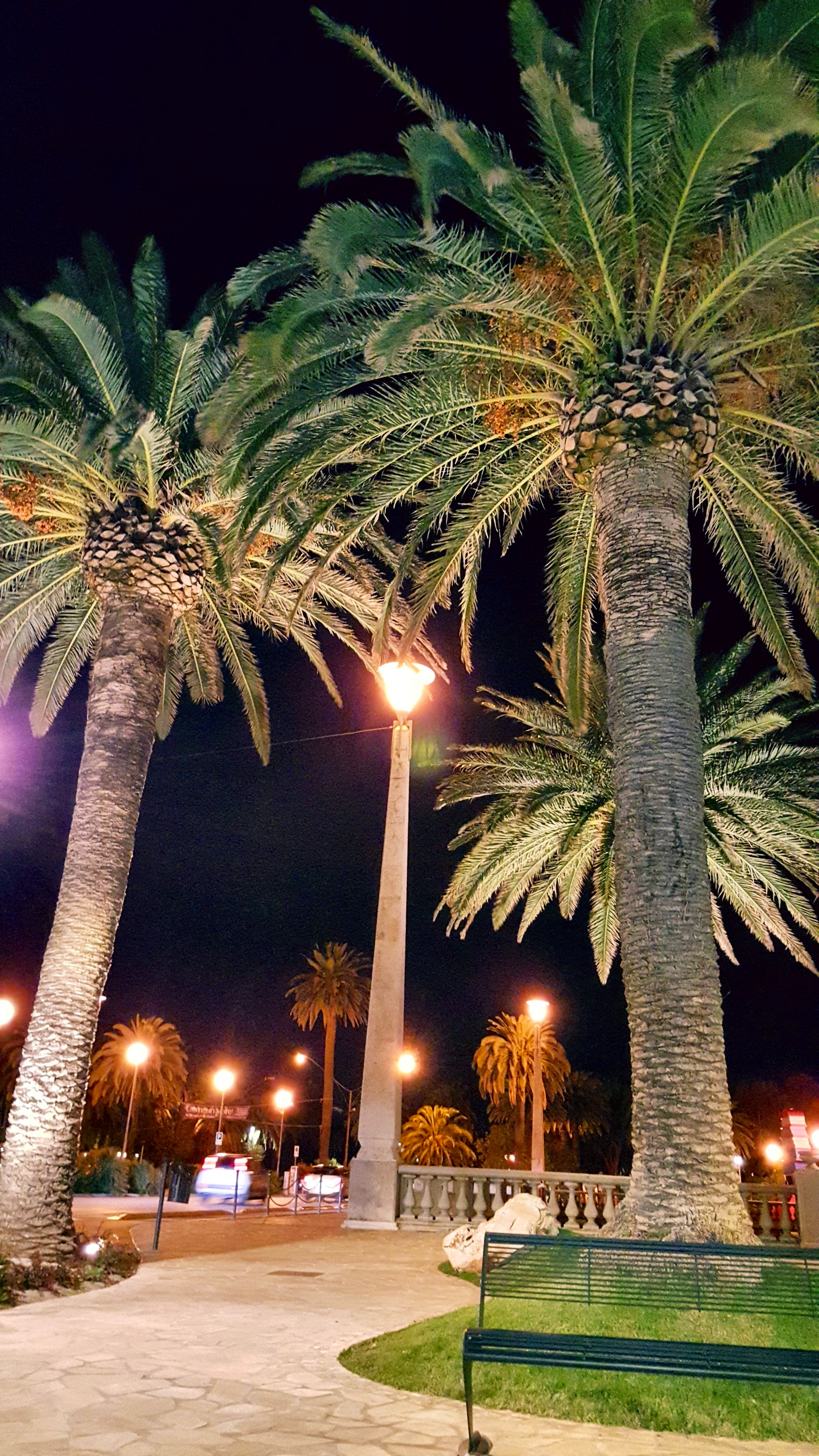 San Benedetto del Tronto, tratto pedonale del lungomare nord fra le Palme